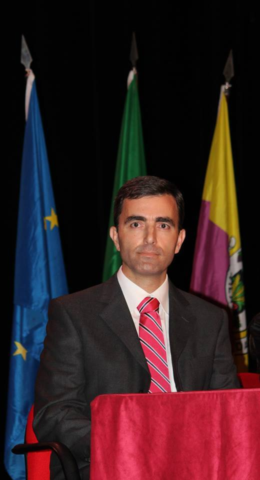 Presidente da CM Lousada